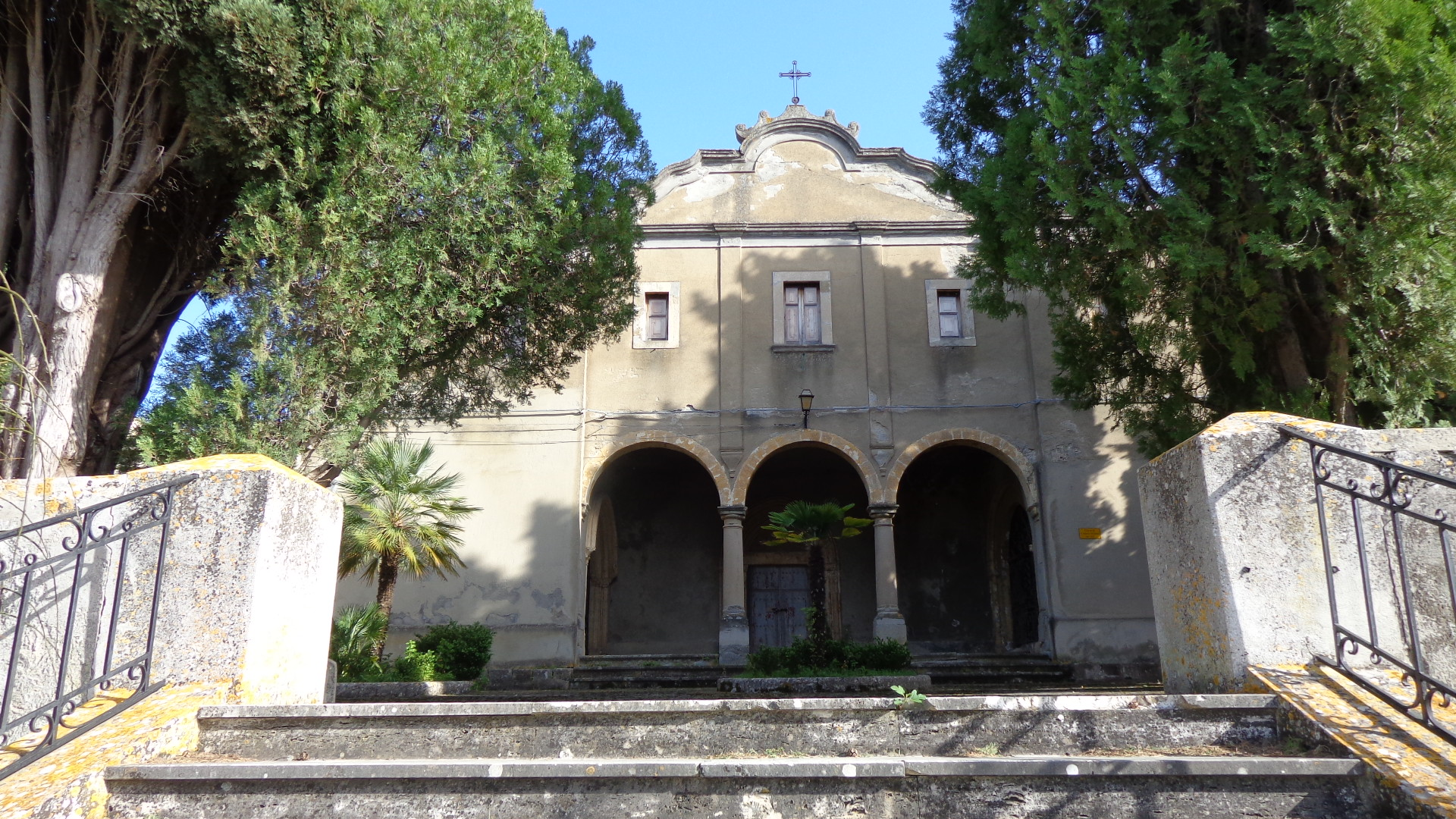 Facciata chiesa di Santa Maria di Gesù